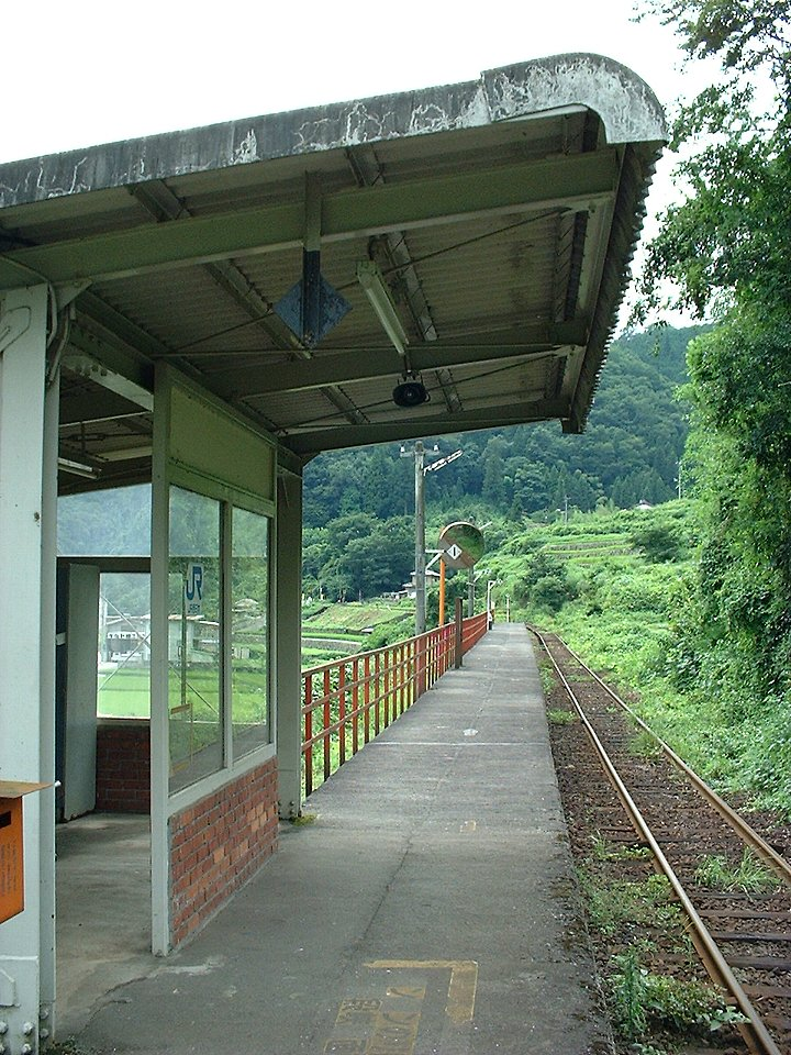 可部線（廃止区間）木坂駅 ホーム